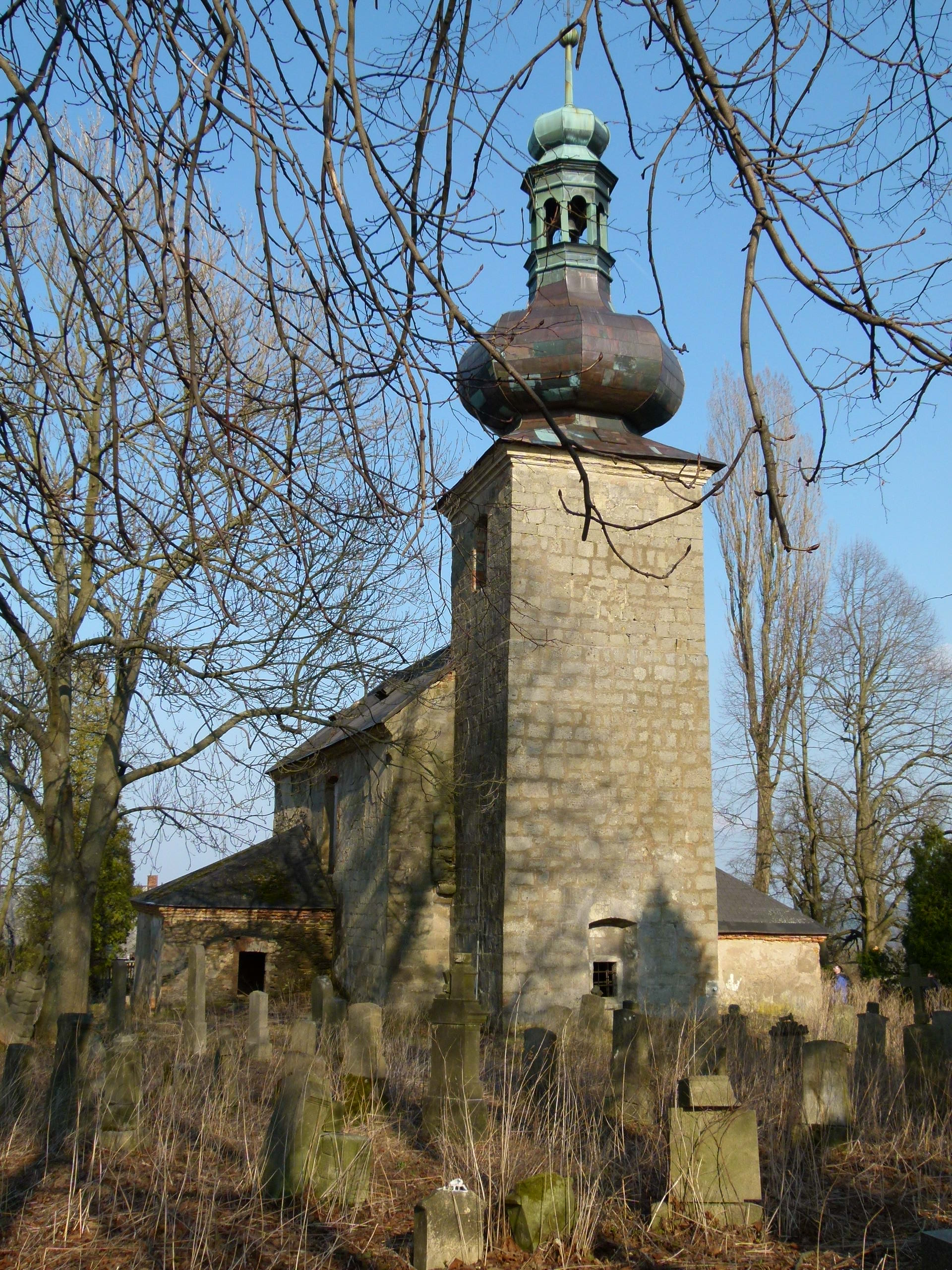 Kostel sv. Ondřeje (Krašov), Krašov